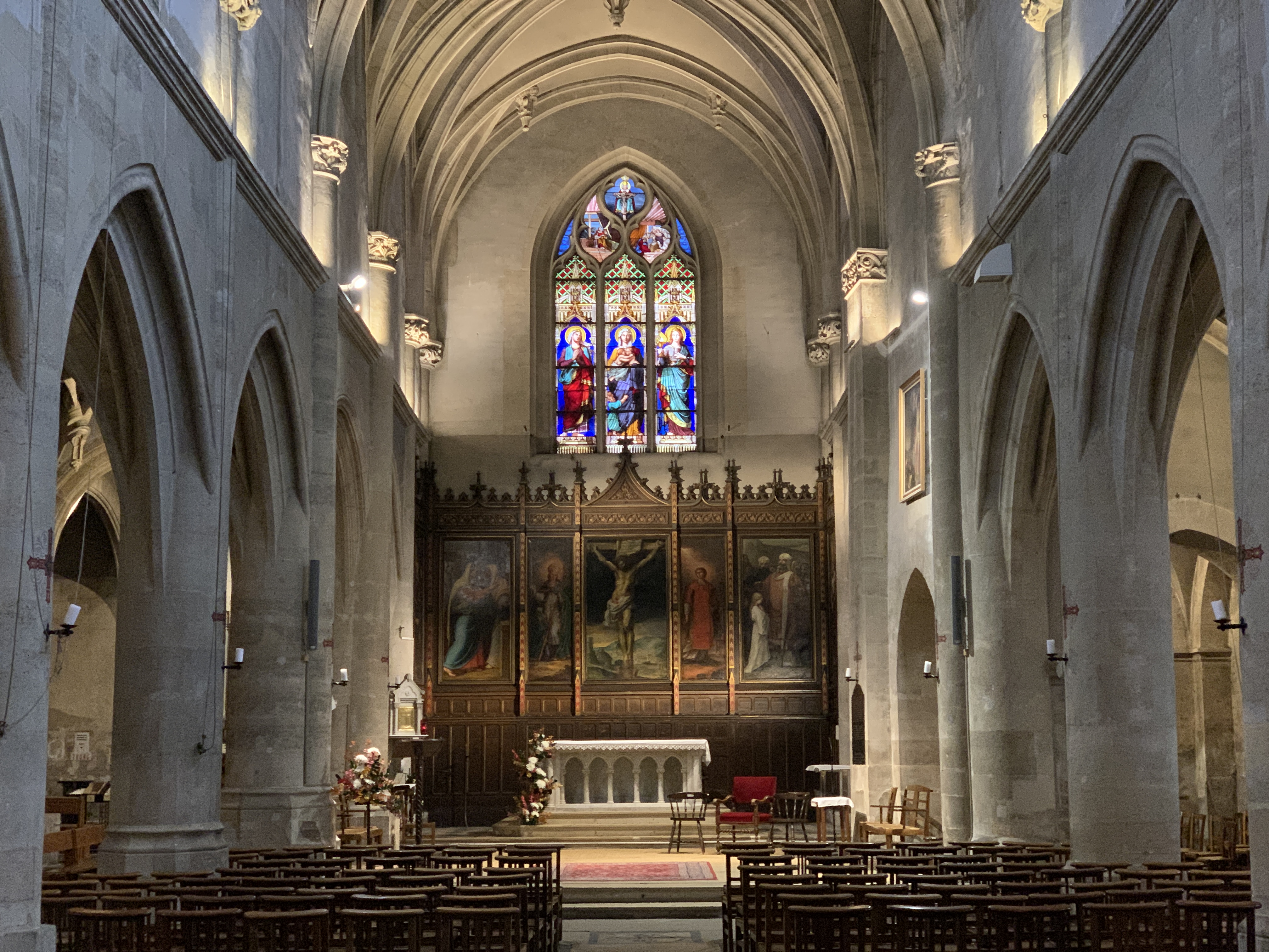 Intérieur de l'église Saint-Germain-l'Auxerrois de Fontenay-sous-Bois.